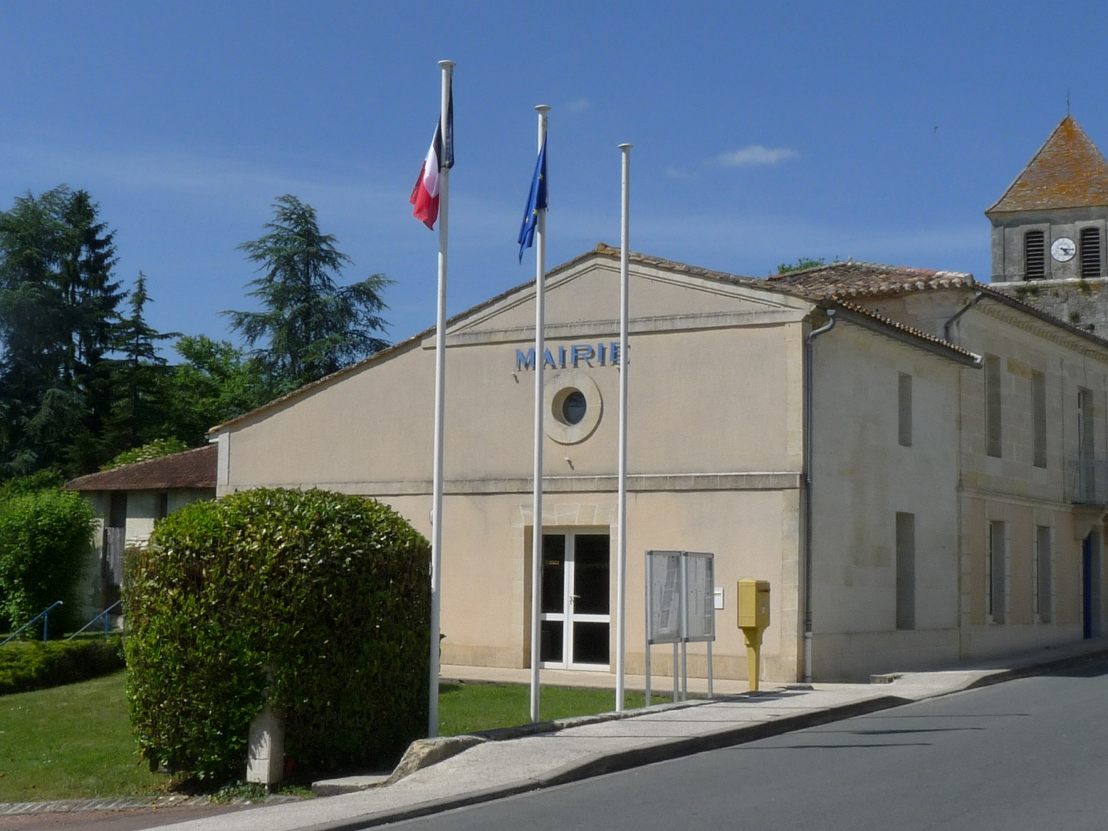 Mairie de St-Martin-du-Bois, Gironde, France